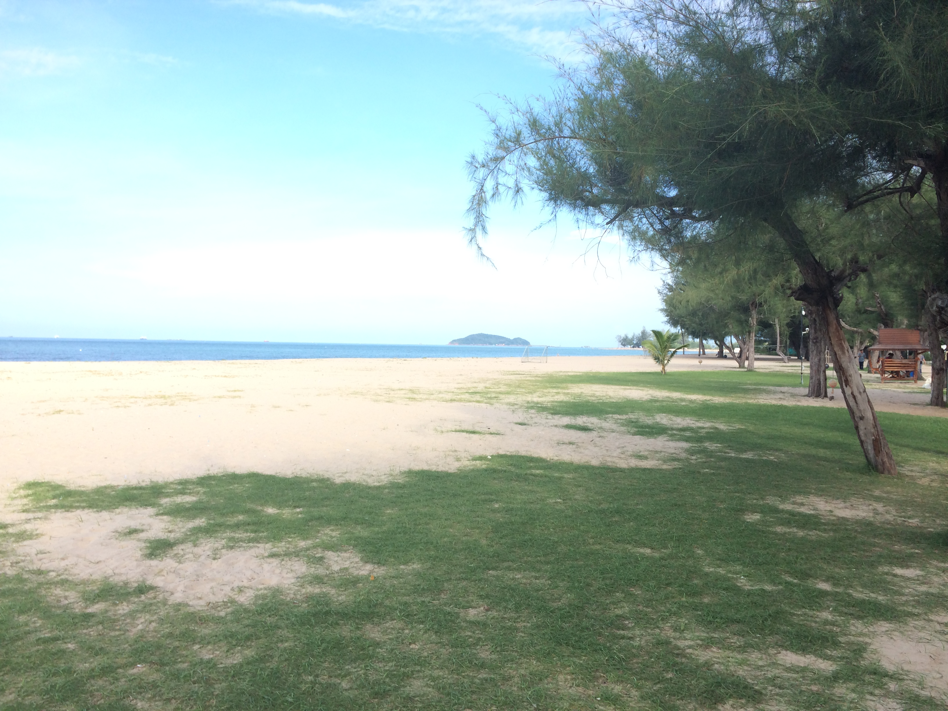 Ching Kho, Singhanakhon District, Songkhla, Thailand